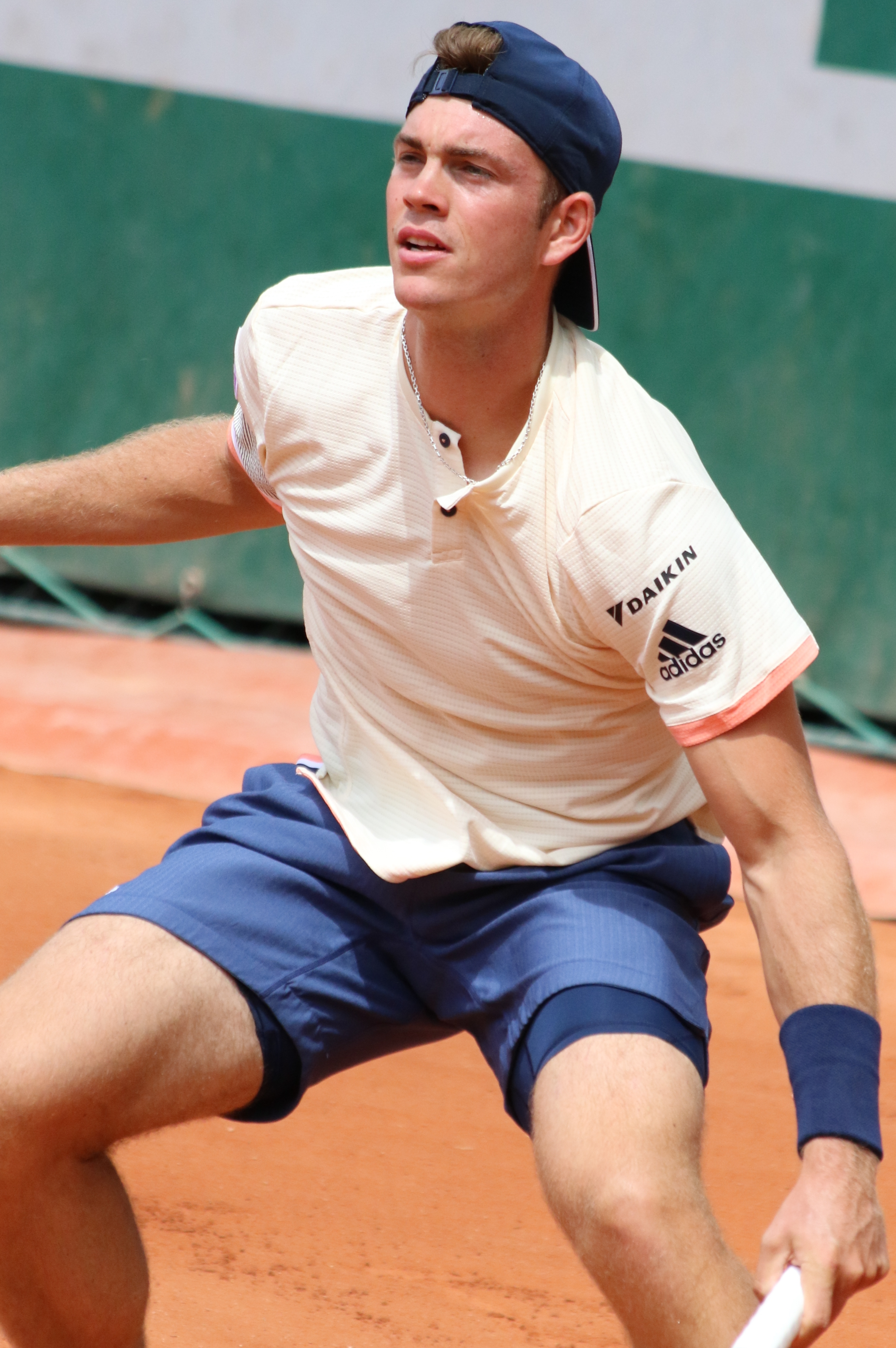 Marterer RG18 (41)